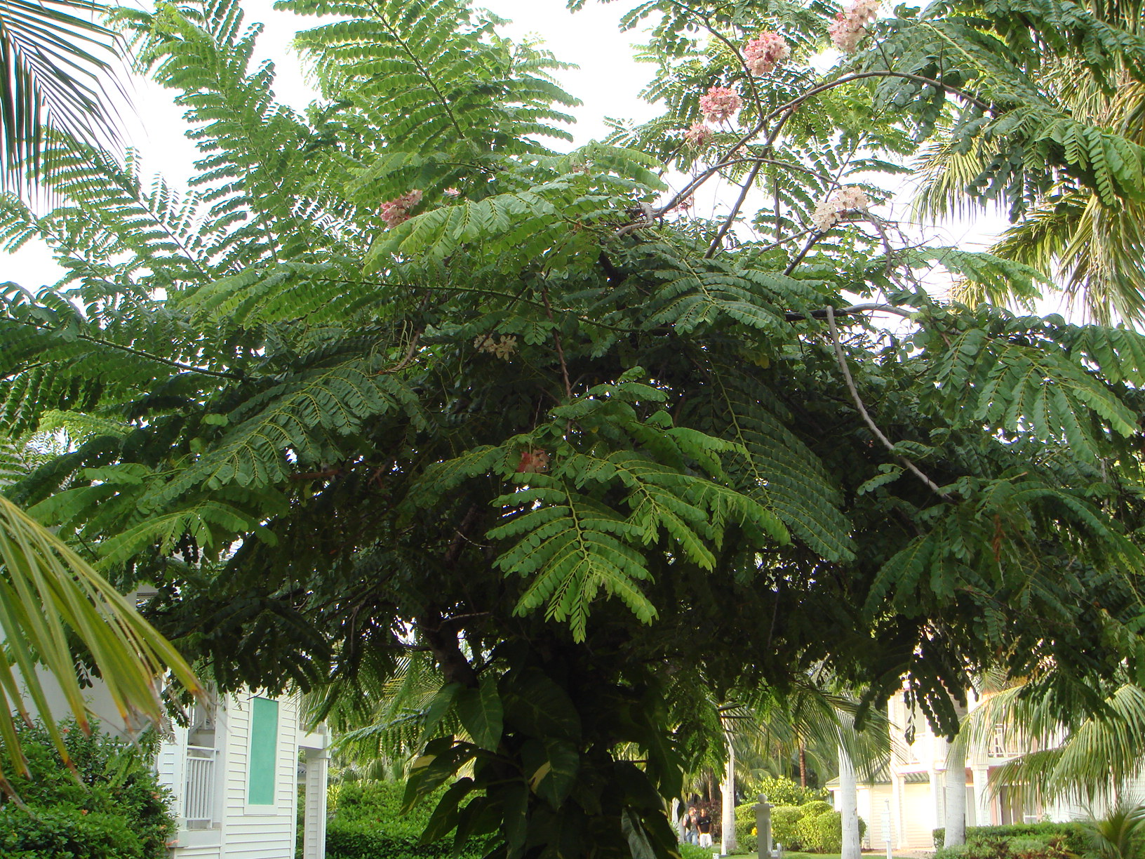 Casia (Cassia nodosa), Varadero, Cuba